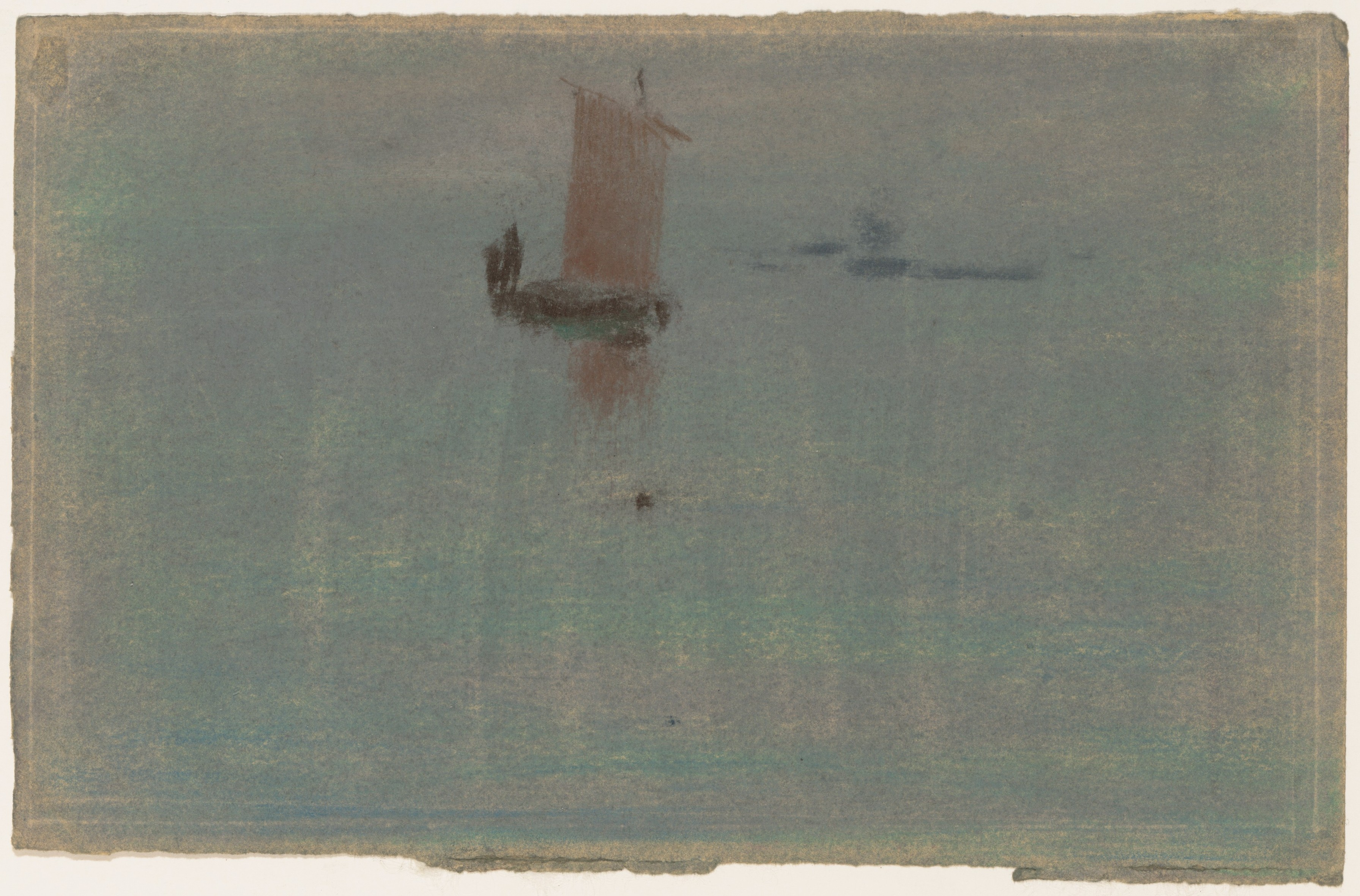 Drawing; Drawings